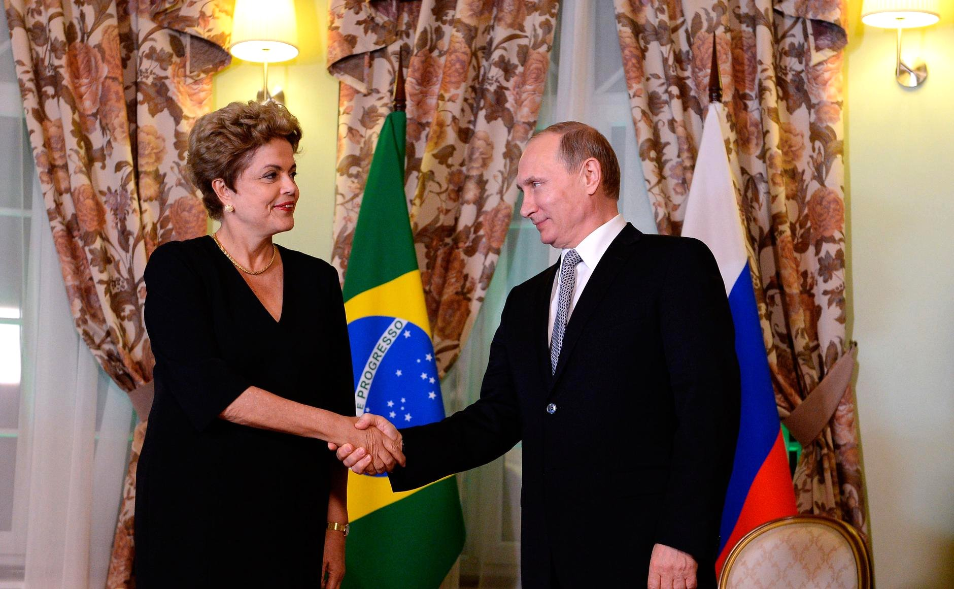 Встреча Президента России Владимира Путина с Президентом Федеративной Республики Бразилия Дилмой Роуссефф.